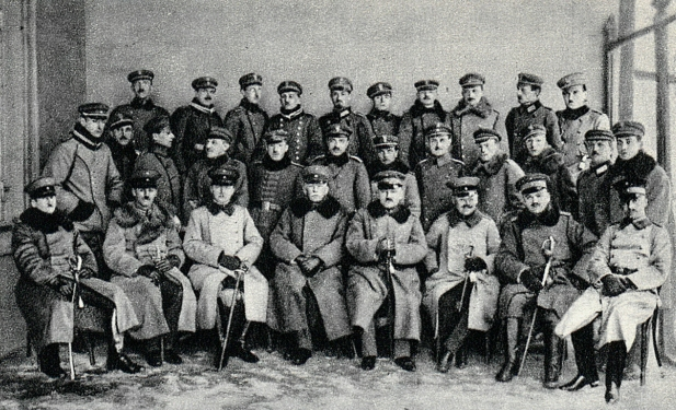 Grupa absolwentów kursu wojennego oficerów Sztabu Generalnego w Warszawie z gen. Felixem von Barthem (pośrodku).